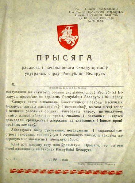 Тэкст Прысягі радавога і начальніцкага складу органаў унутраных спраў Рэспублікі Беларусь